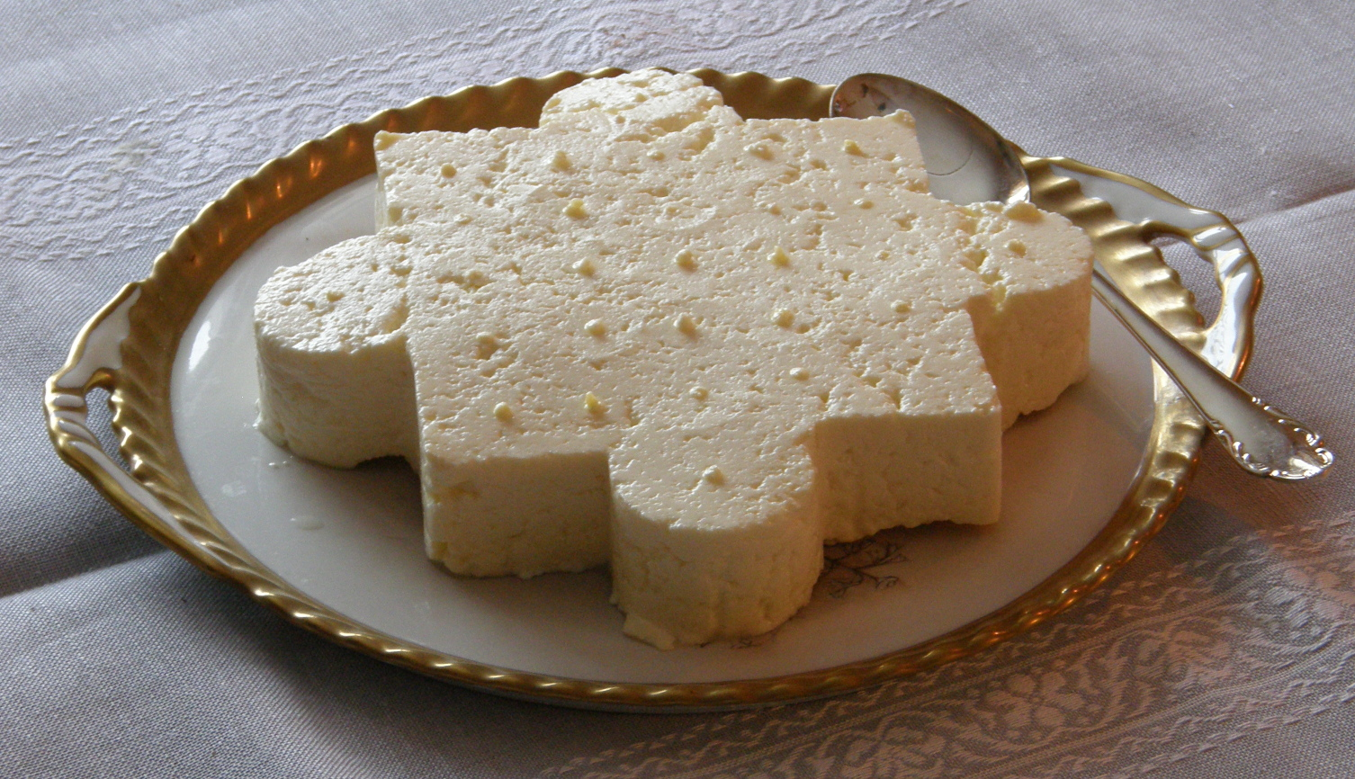 Äggost, traditional dish/dessert from Bohuslän, Sweden